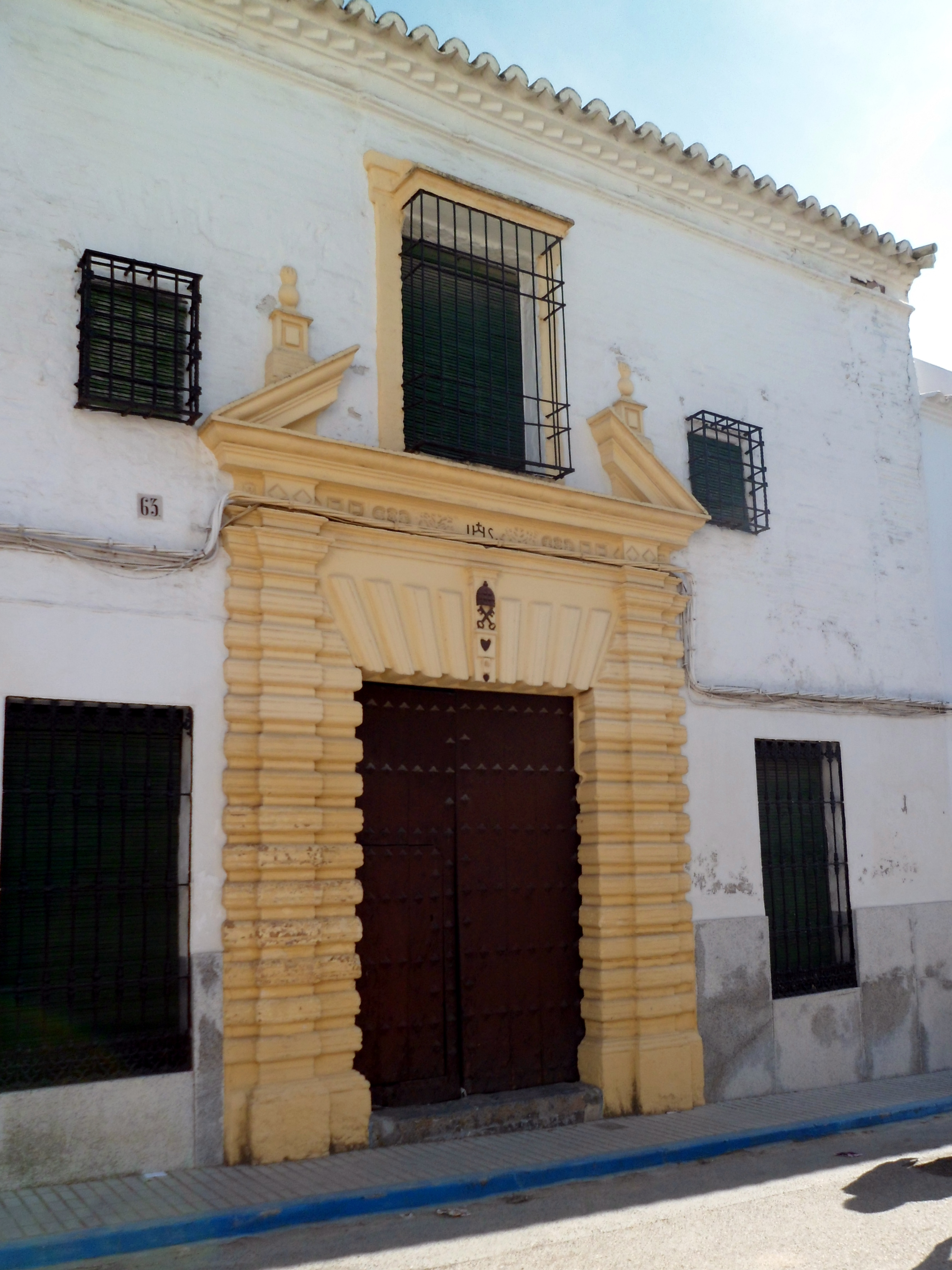 Casa de Capellanía de Montalbán de Córdoba (España). Situada en la calle Empedrada, nº 63.